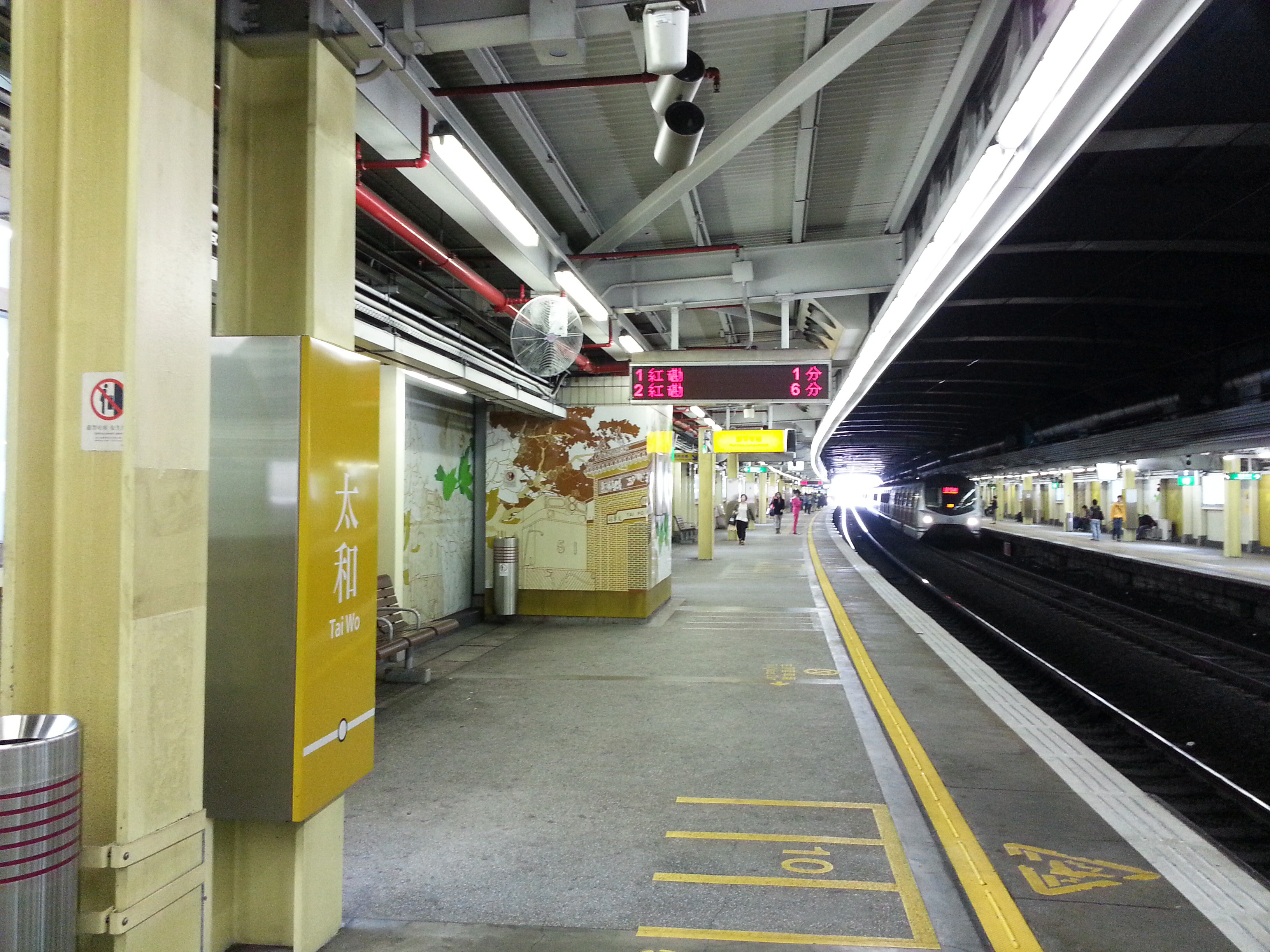 港鐵太和站月台